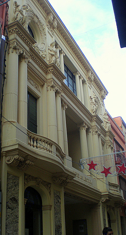 Reus - Centre de Lectura, de renom i prestigi nacional, fou fundat el 1859 pel grup de menestrals i obrers d´idees properes al federalisme que s´aglutinava a l´entorn del periodista J. Güell i Mercader. Al llarg de la seva història, pel seu tarannà progressista, ha estat clausurat el 1866 i el 1939 i reobert el 1868 i el 1948. Des del 1897 el Centre és instal-lat al Carrer Major, on hi havia el Palau dels Marquesos de Tamarit, totalment desaparegut amb les obres de reforma. El 1916 l´edifici fou adquirit pel financer Evarist Fàbregas, que el cedí al Centre, i que finançà les obres de reforma. El nou edifici, amb façana de to renaixentista, amb escultures de F. Garcia i Escarré, fou dissenyat per Josep Simó i Bofarull. L´obra, d´aires presumptuosos, era designada pels periòdics satírics "la Catedral de Guix". L´edifici fou inaugurat l´octubre de 1921 pel president de la Mancomunitat J. Puig i Cadafalch. El 1939 se n´emparà la CNS que, amb altres organismes oficials o paraoficials, s´hi mantingué fins el 1948. Inclòs al Centre hi ha el Teatre Bartrina, un bell local del darrer modernisme, inaugurat el 1918.